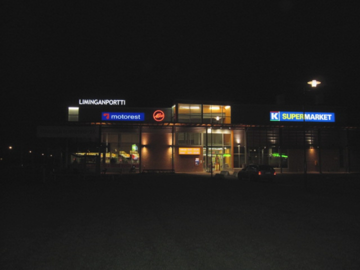 Liikekeskus Liminganportti Limingassa.